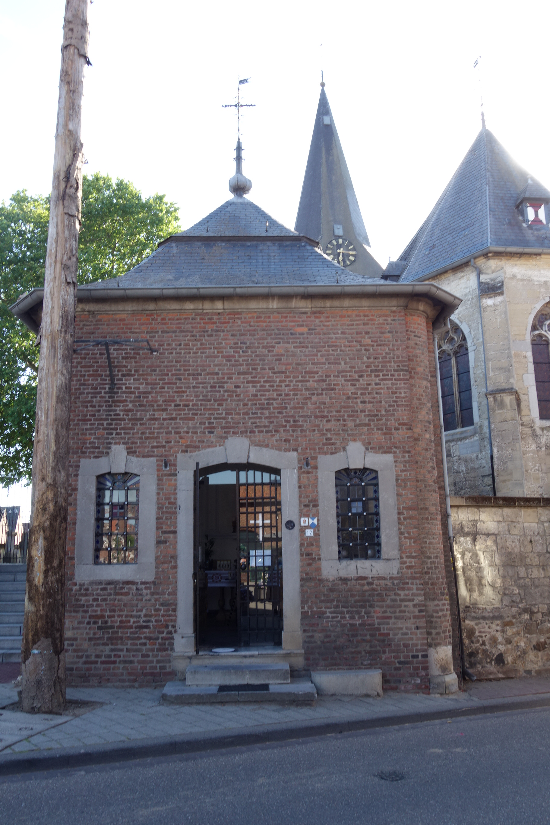 Sint-Brigidakapel in Noorbeek, gezien vanaf d'r Pley, in juni 2020.